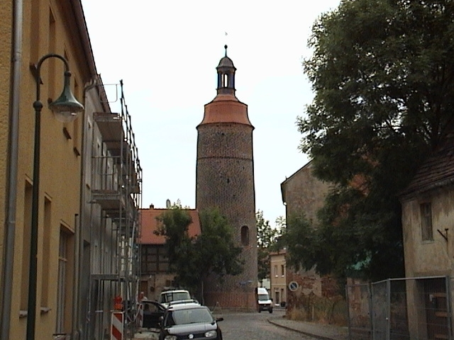 Stadtmauerturm in Prettin